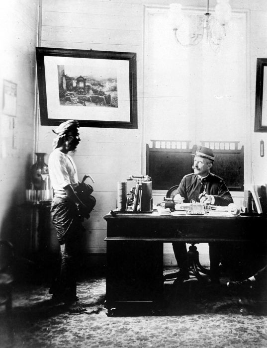 Repronegatief. Het kantoor van Civiel Gezaghebber majoor Klaas van der Maaten, die in gesprek is met Waki Wahab